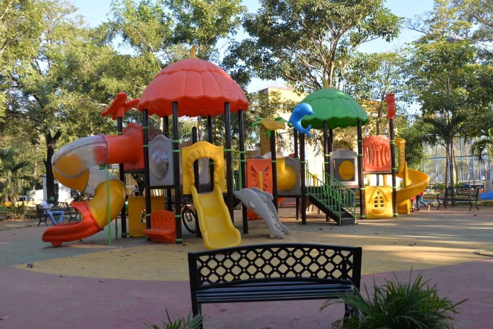 El patio de recreo en el parque central de Tisma